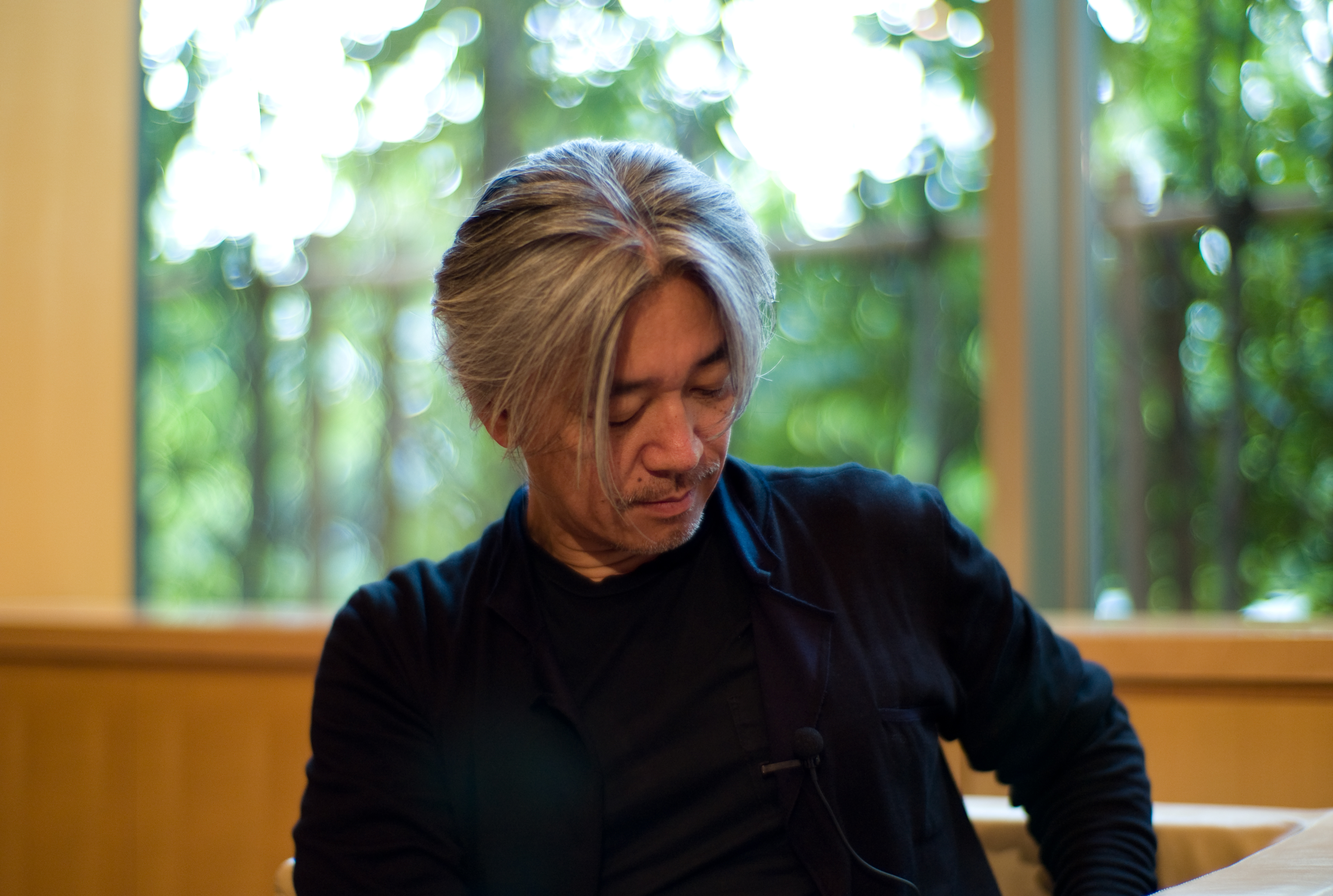 Ryuichi Sakamoto